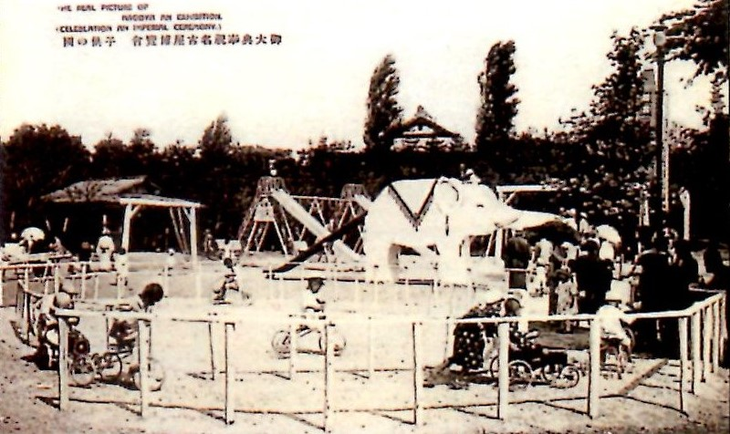 1928年に鶴舞公園で開催された御大典奉祝名古屋博覧会。会場内にあった遊園地。